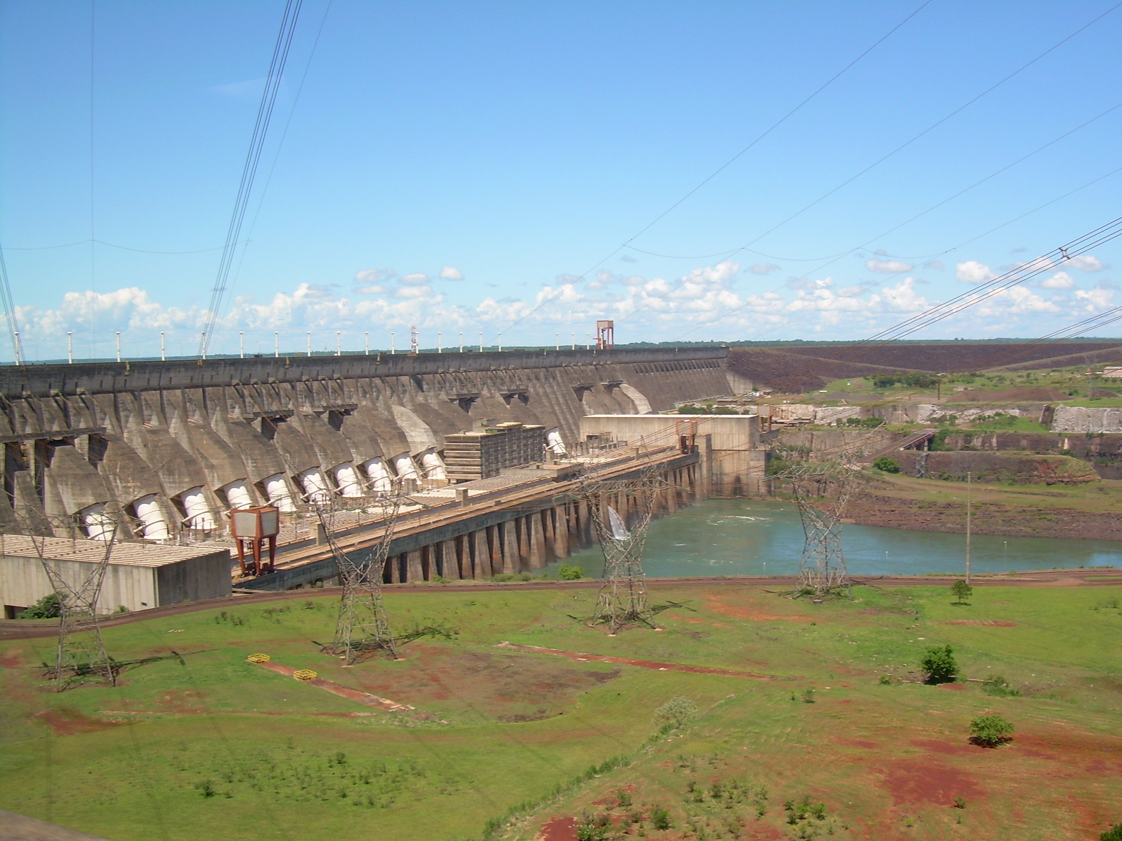 Itaipu